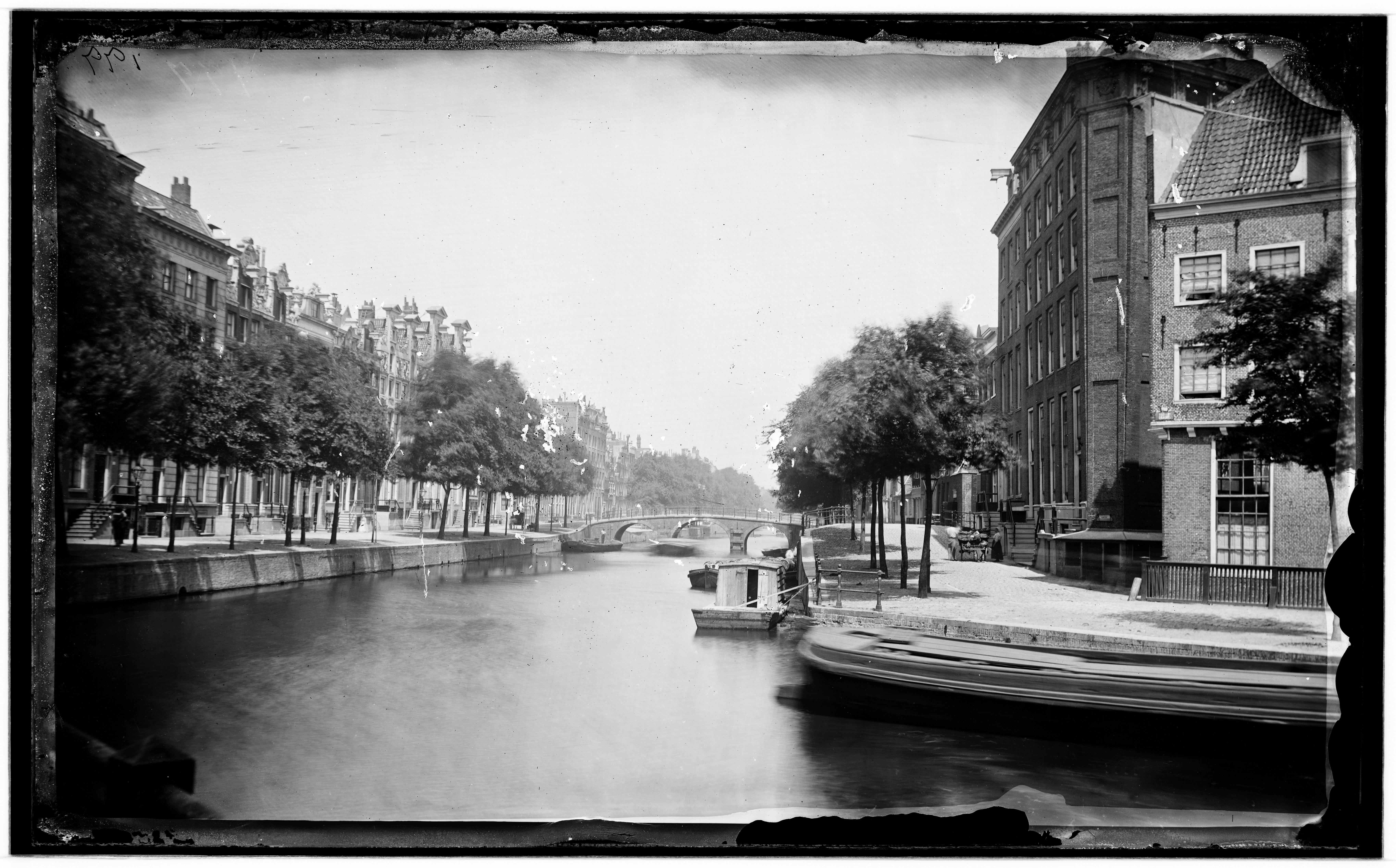 Beschrijving De Herengracht gezien vanaf de Vierheemskinderensluis (Brug 28) over de Leidsegracht naar de Beulingstraat en de Vingboonsbrug ( Brug 26) tussen de Huidenstraat en de Wijde HeisteegRechts de zijgevel van Beulingstraat 27. Oorspronkelijke kabinetfoto uitgegeven door A. Jager.Documenttype fotoVervaardiger Jager, A.Collectie Collectie Kunsthandel Gebr. Douwes: glasnegatievenDatering 1867 t/m 1883Geografische naam BeulingstraatHerengrachtInventarissen B00000031435 Generated with Dememorixer